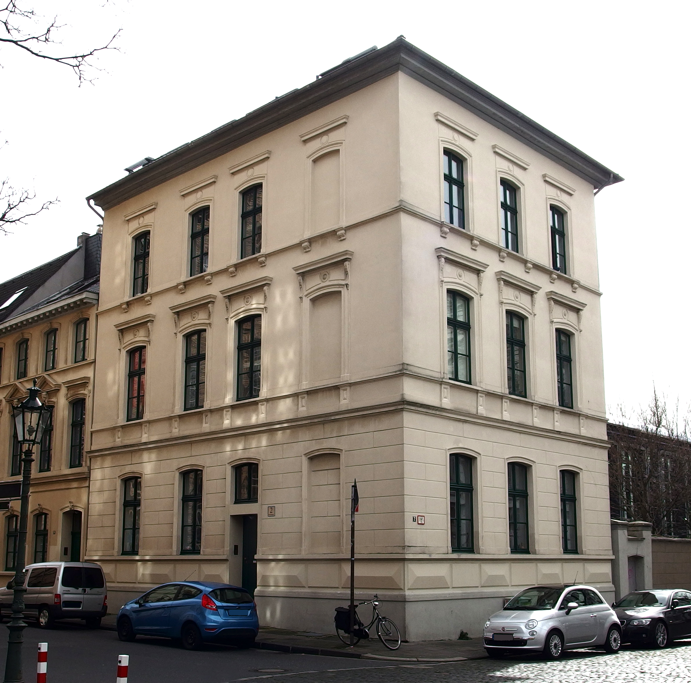 Haus Reuterkaserne 2, Düsseldorf-Altstadt